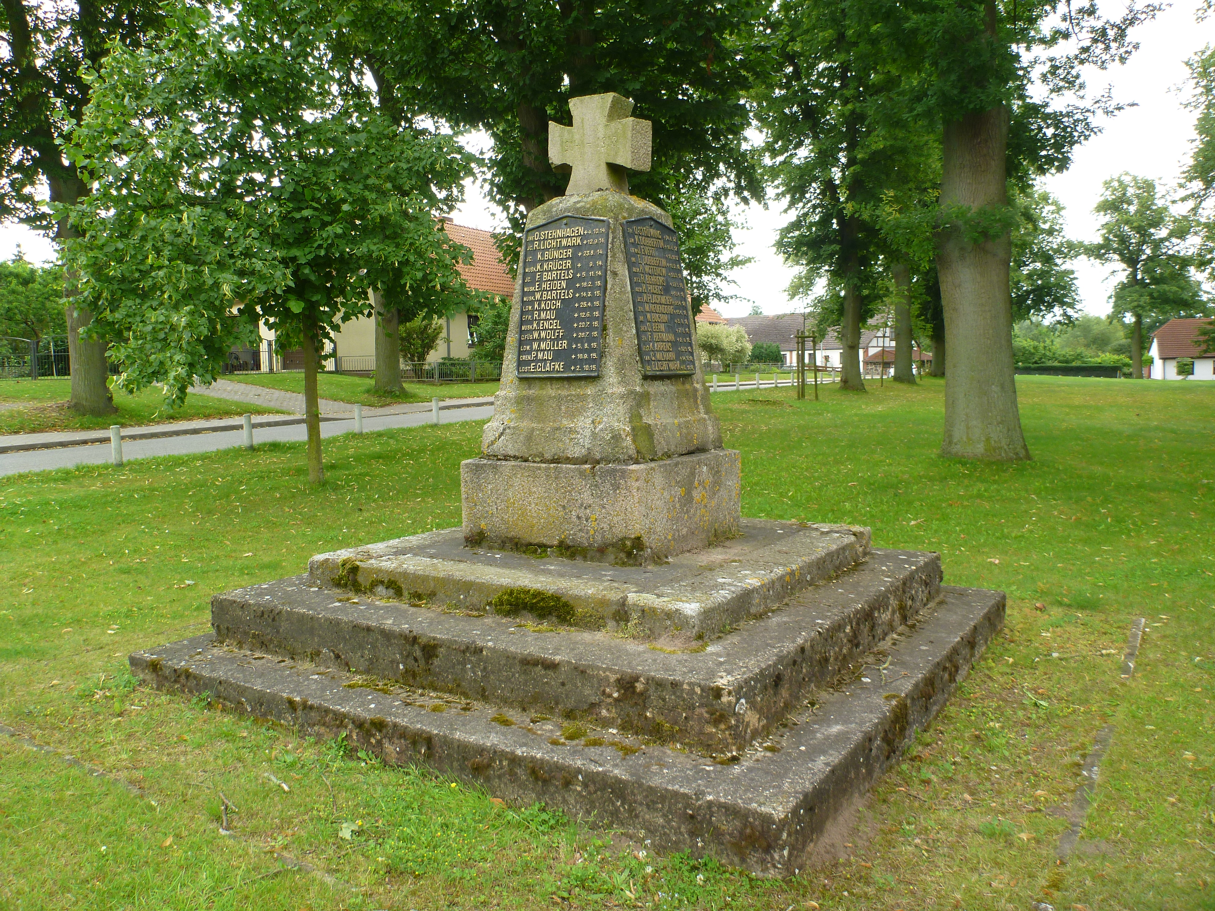 Dorfanger mit Kriegerdenkmal 1914/1918